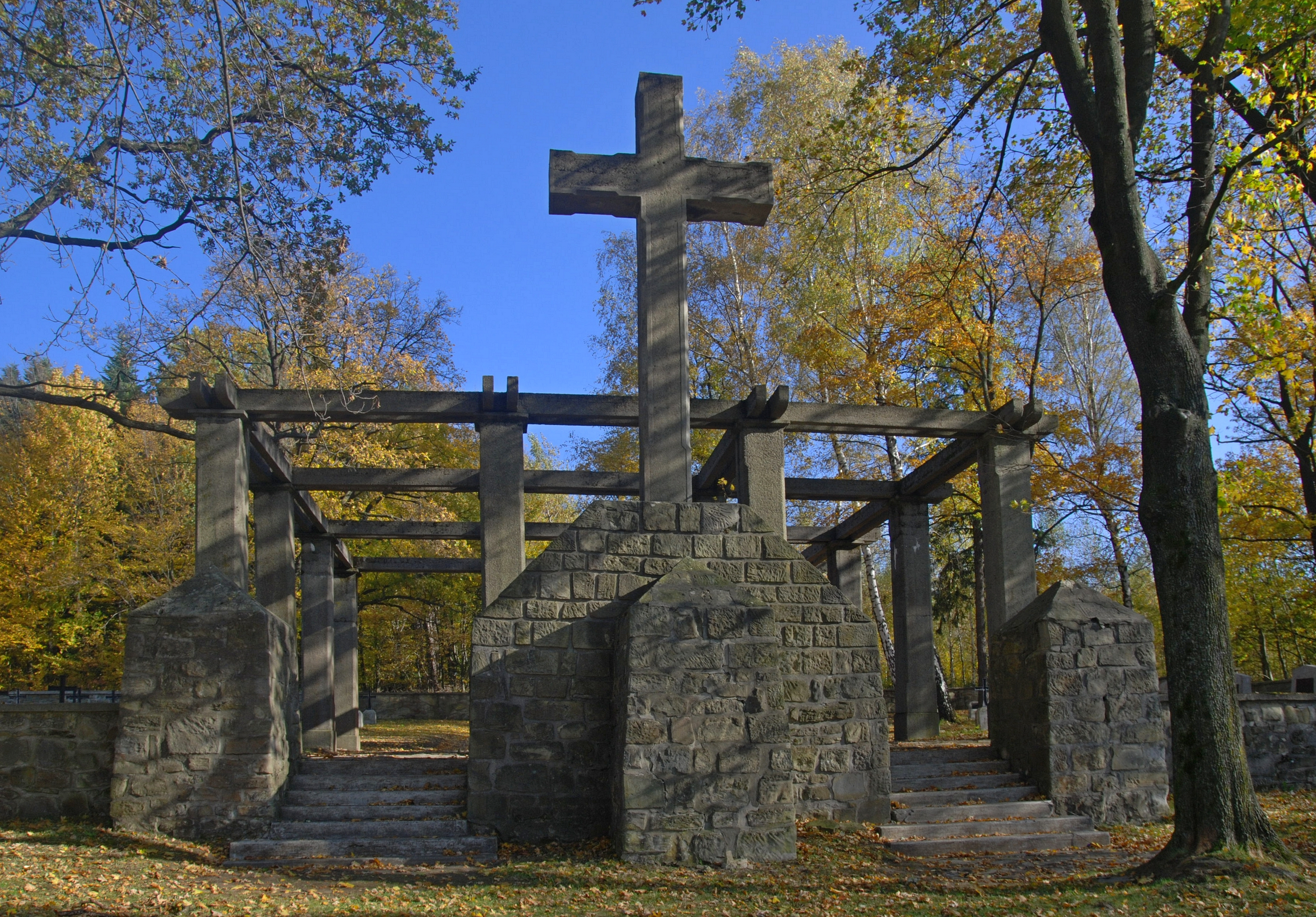 wieś Sękowa